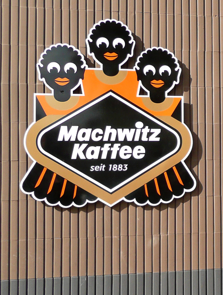 Symbol Machwitz Kaffee an Firmensitz